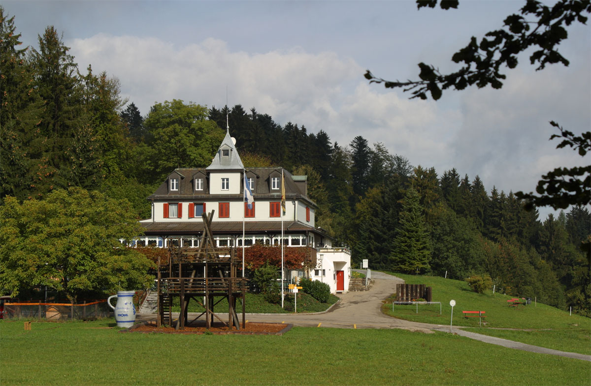 Restaurant Hochwacht auf dem Pfannenstiel